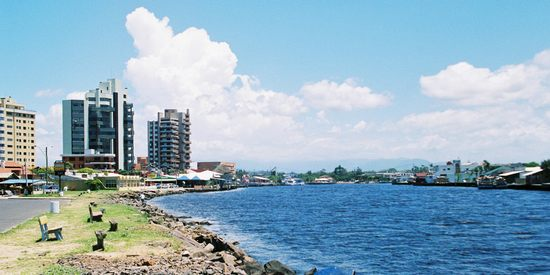 Foto feita em Torres (RS), na divisa entre o Rio Grande do Sul (à esquerda) e Santa Catarina (à direita). O nome do rio é Mampituba. Picture made in Torres (Brazil, Rio Grande do Sul state), in the frontier of the Rio Grande do Sul (at left) and Santa Catarina (at right) states. The river's name is Mampituba. Picture made by Bruno da Silva Lessa 16:57, 17 March 2006 (UTC)